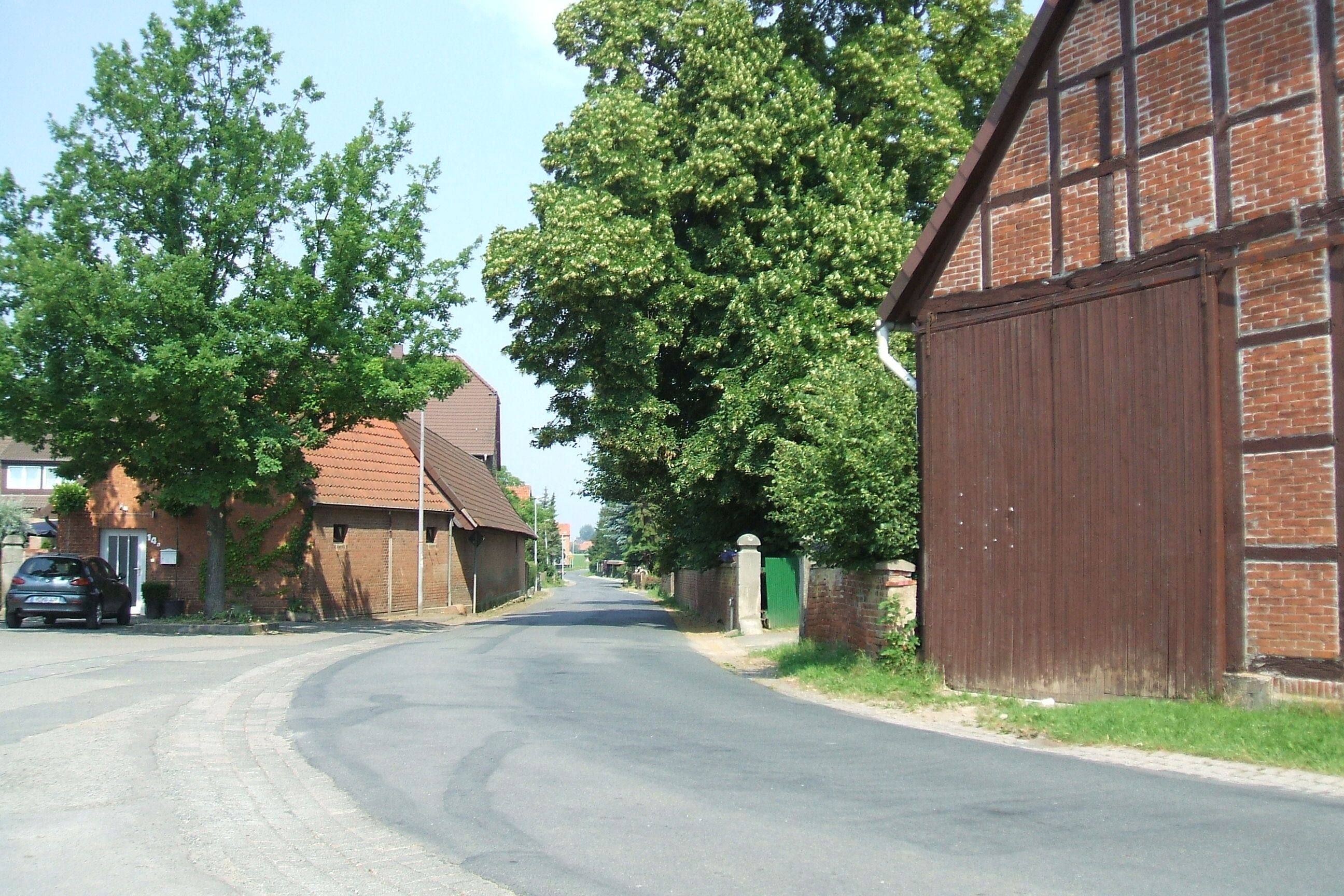 Pattensen, Ortsteil Oerie, die Hauptstraße